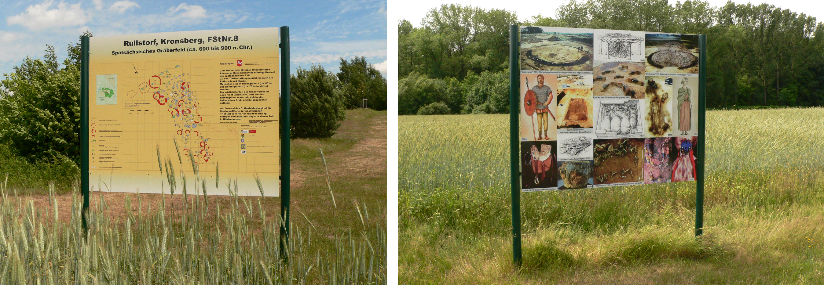 Hinweistafeln M Kronsberg bei Rullstorf